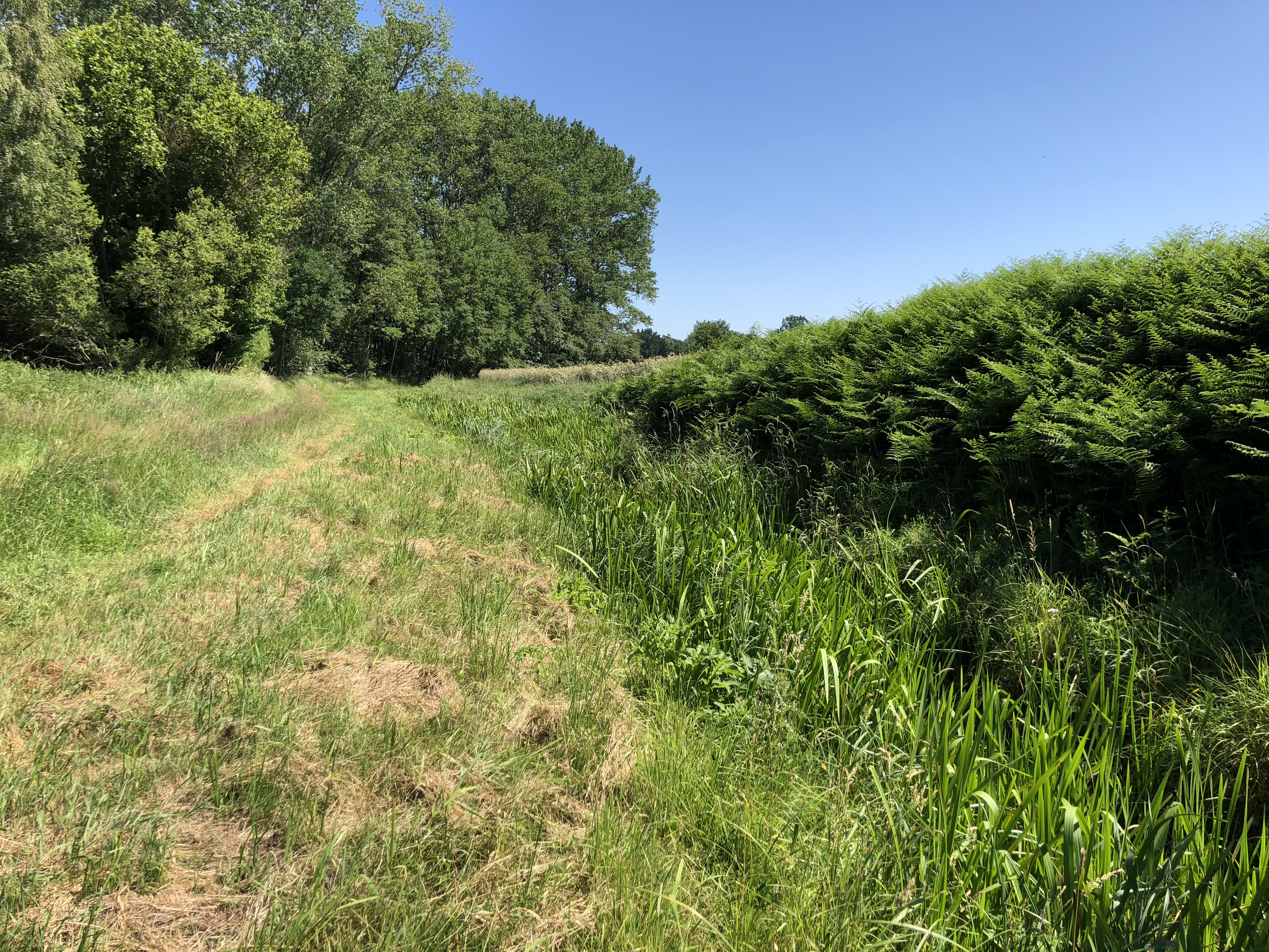 Au an de Grenz von Sounsiek na Vierden